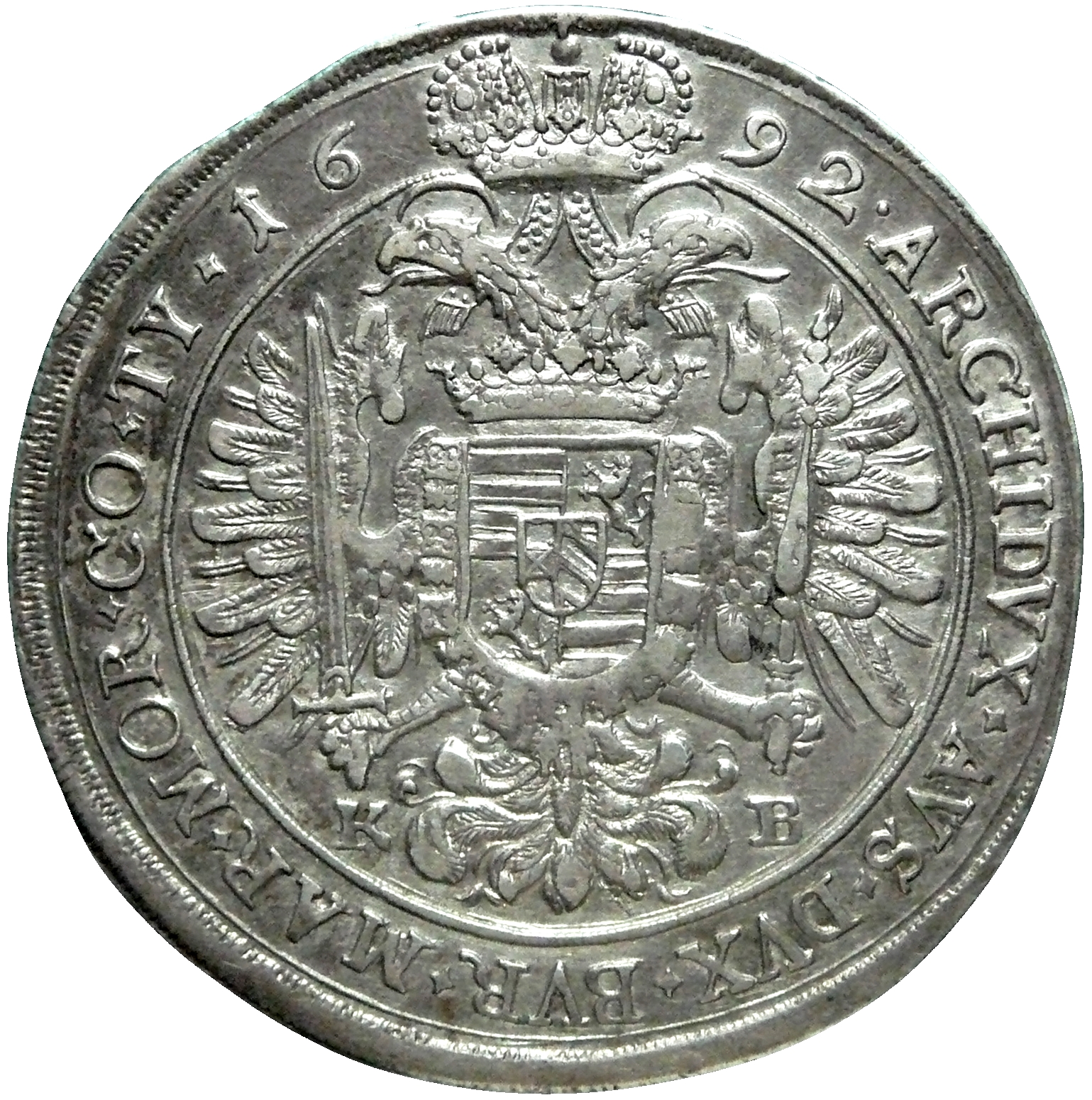 Reichsspeziestaler Breiter Taler 1692 Königreich Ungarn im Heiligen Römischen Reich Deutscher Nation Kaiser Leopold I. Wert = 90 Kreuzer = 1 ½ Gulden (Forint) Reichsmünzfuß 8 Stück a.d.r. Mark, 9Stück a.d.f. Mark Silber 14 Lot 4 Grän = 888,889‰ Feingewicht: 25,984 g Raugewicht: 29,232 g Prägung in dieser Variante nur 1692 Münzstätte Körmöczbánya (Kremnitz) Außerkurssetzung nach Einführung des Konventionsmünzfußes 1748 für 1 Taler 11 Groschen Konventionsgeld Gewicht: 28,80 g Durchmesser: 46,69-47,35 mm Dicke: 2,05 mm Zainende Kante glatt Nimbierter Doppeladler unter schwebender Kaiserkrone, in den Fängen Schwert und Zepter, auf der Brust gekröntes viergeteiltes Wappenschild (1. und 4. Feld ungarische Querbalken; 2. und 3. Feld böhmischer Löwe), umgeben von Kette vom Goldenen Vlies; durch Adlerschwanz getrenntes Münzstättenzeichen: KB Fortsetzung der Titelumschrift zwischen zwei Zierkreisen oben beginnend nach rechts: ARCHIDUX AUSTRIAE DUX BURGUNDIAE MARCHIO MOORAVÆ COMES TYROLIS Erzherzog von Österreich, Herzog von Burgund, Markgraf von Mähren, Graf von Tirol